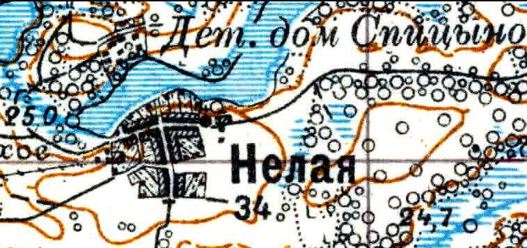 Топографическая карта Ленинградской области, квадрат Vc-29 (Батецкая), деревня Нелаи